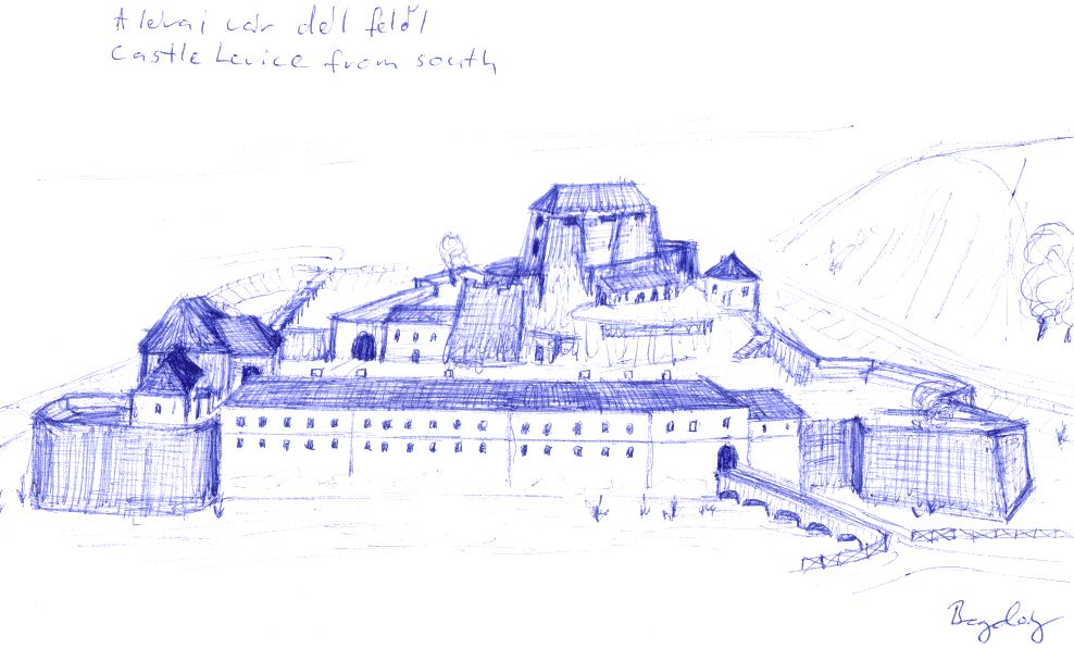 A lévai vár rekostrukciós rajza